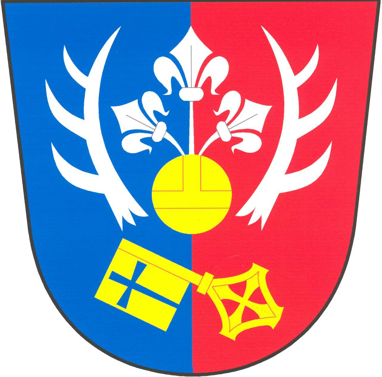 Znak obce Cizkrajov